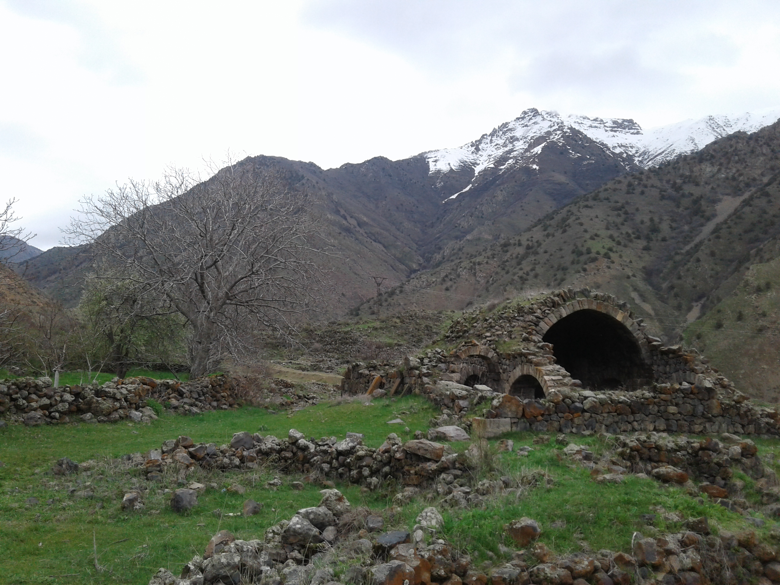 Հոստուն գյուղատեղի, Վայոց ձոր, Արտաբույնք